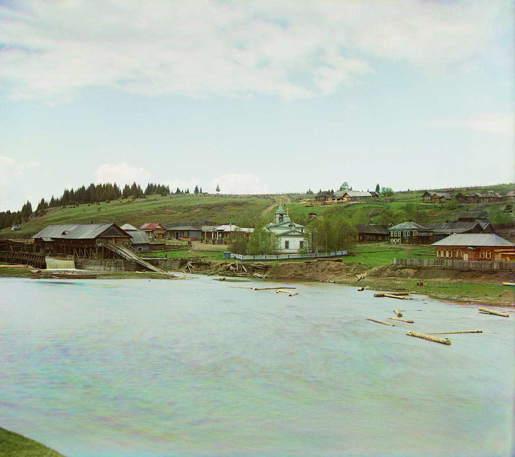 . М. Прокудин-Горский. Пристань "Илимка". Место постройки двадцатисаженных "коломенок". Илимский перебор. [Река Чусовая.] 1912 год